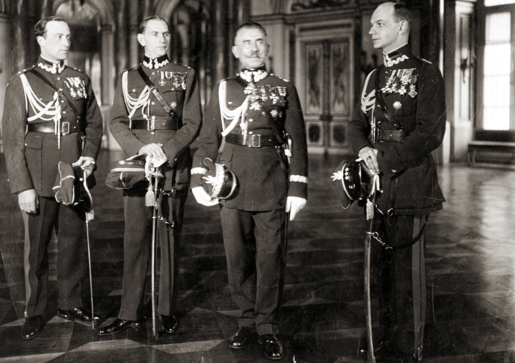 Adiutantura Generalna Prezydenta RP Stanisława Wojciechowskiego. Adiutanci prezydenta: generał Mariusz Zaruski, major Andrzej Meyer, kapitan Janusz Horodecki, porucznik Tomasz Łaszkiewicz.